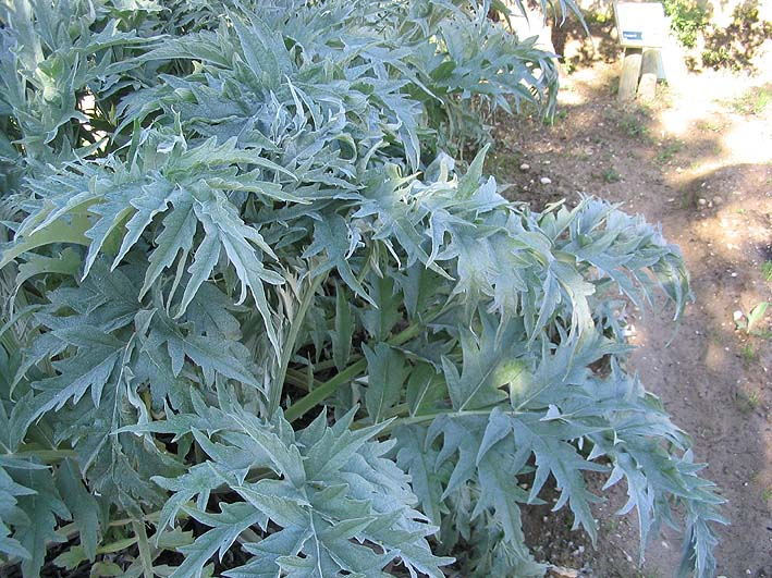 Cardon (feuilles) Photo prise à Deltebre (Espagne) en avril 2004